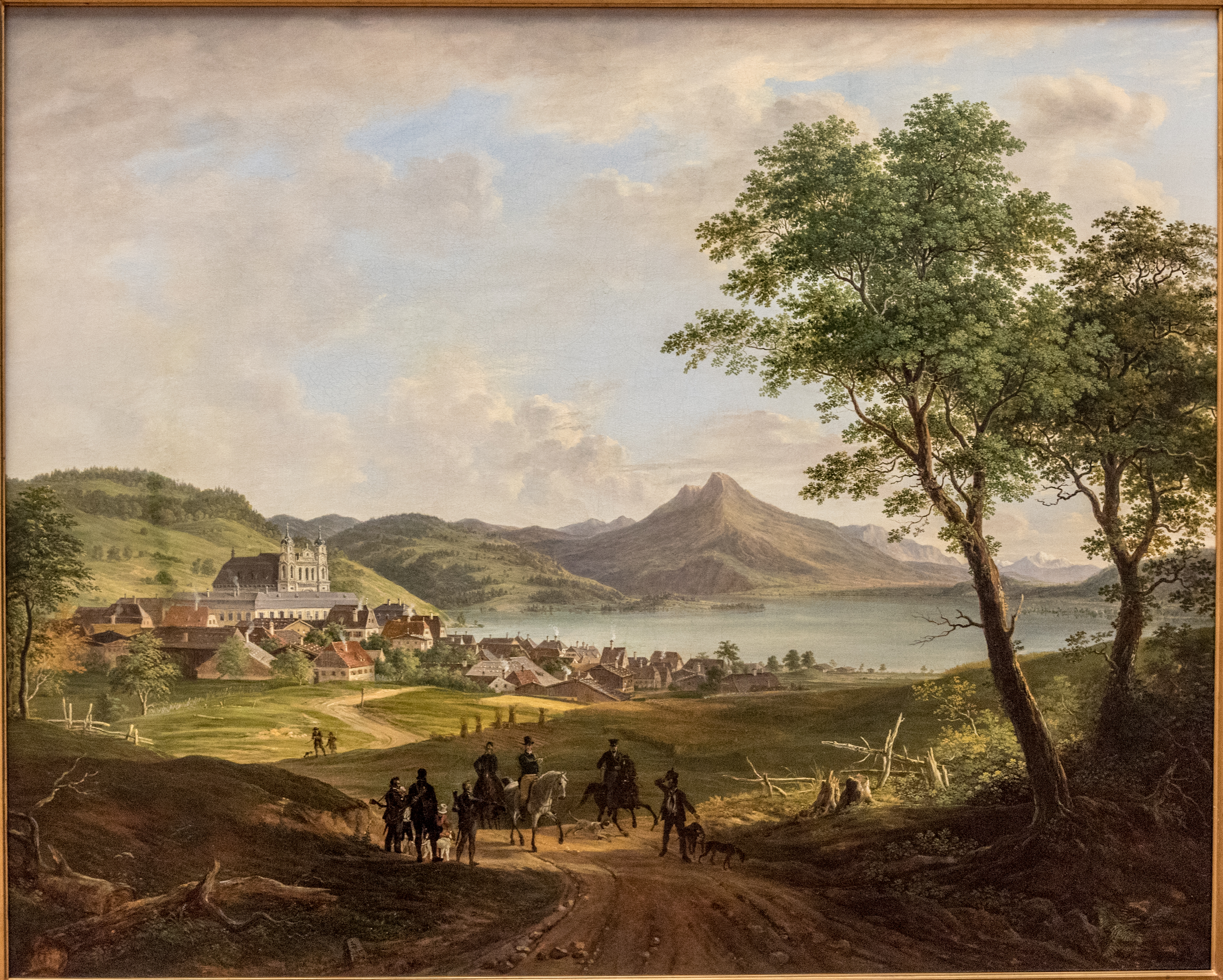 Johann Jacob Dorner d. J., Jagdgesellschaft am Mondsee, um 1817, Museum Georg Schäfer